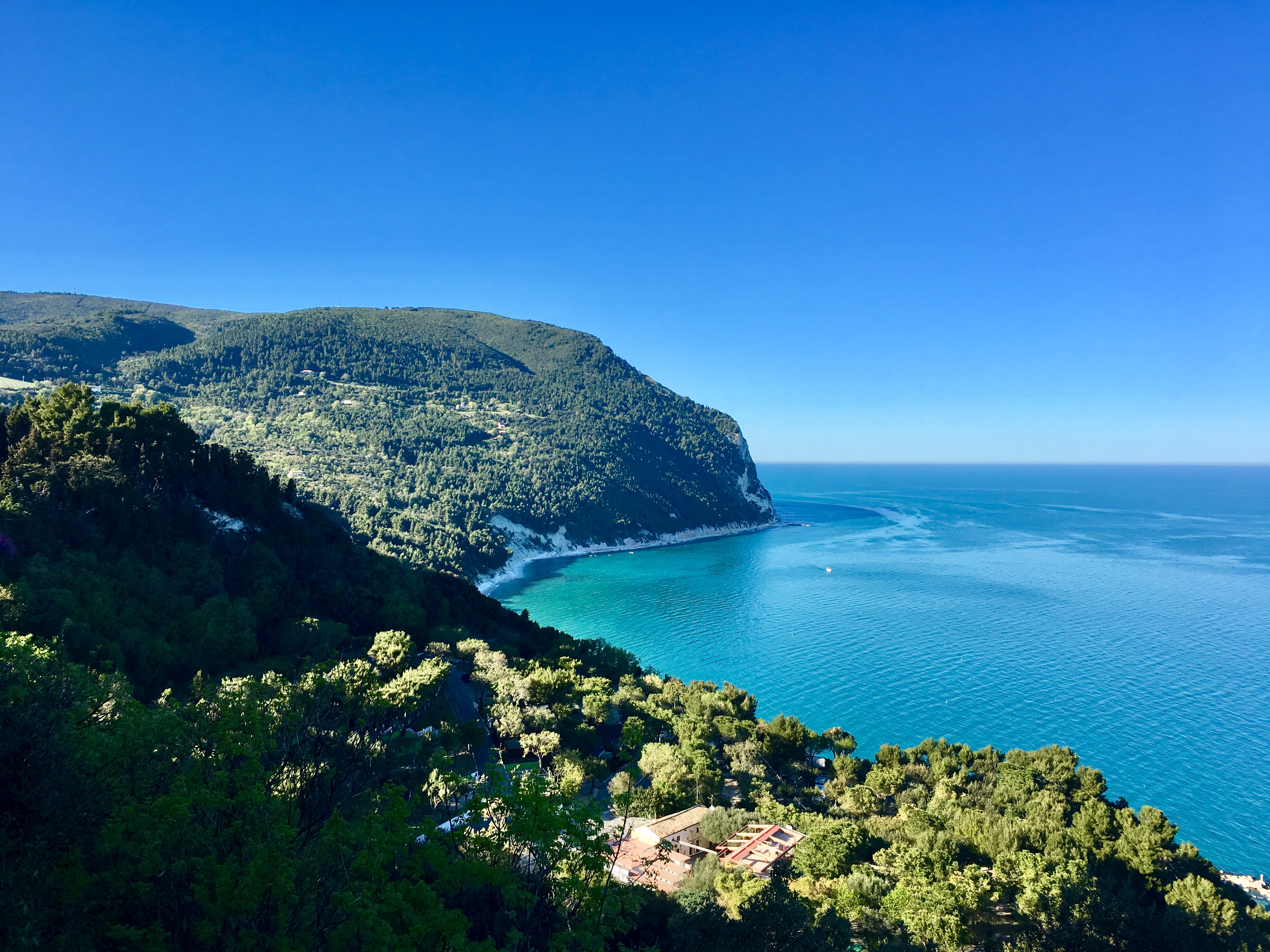 Monte Conero visto dalla piazza principale